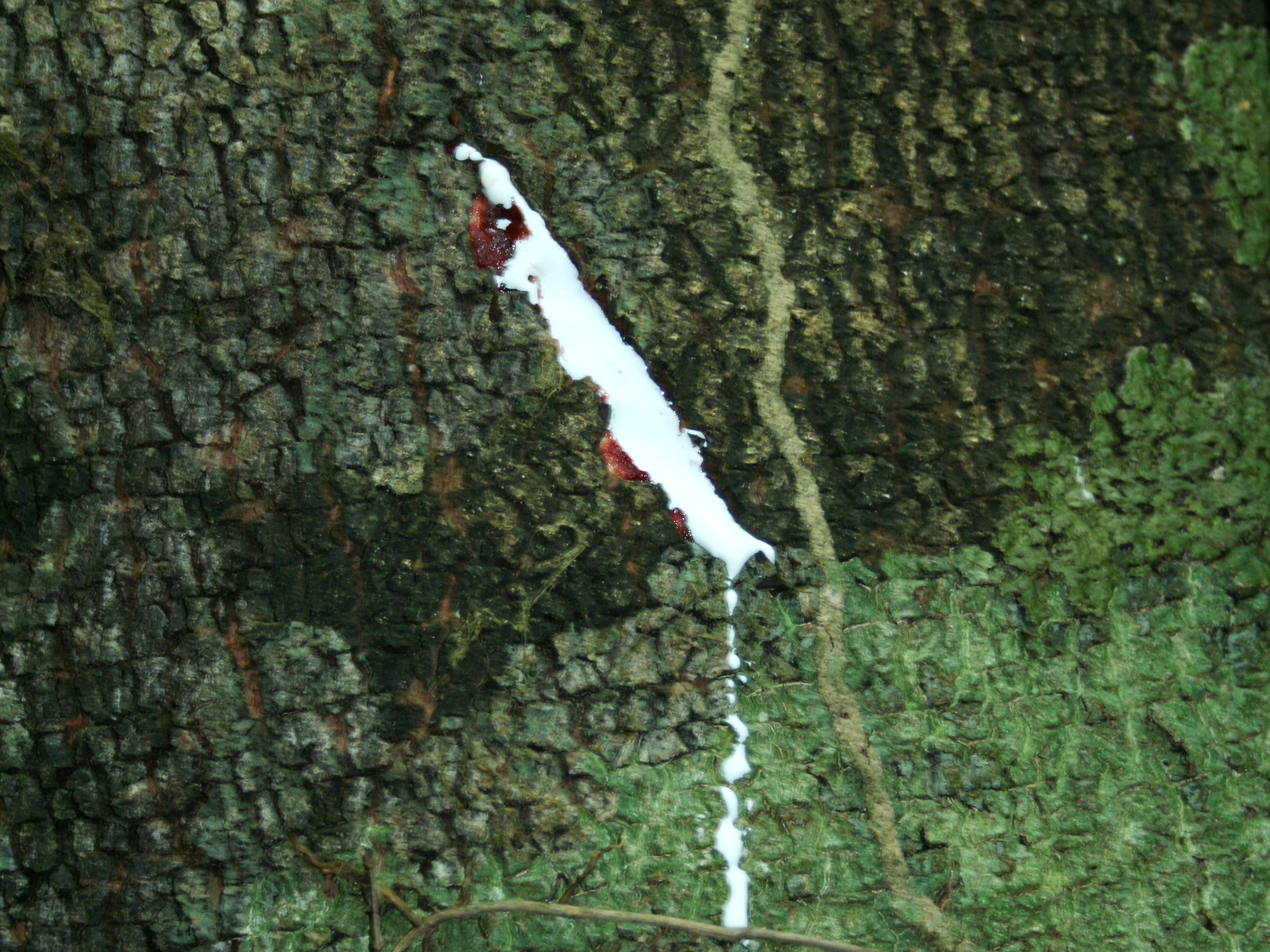 Česky: Latex vytékající z poraněného kmene Couma macrocarpa, Rio Caura, Venezuela